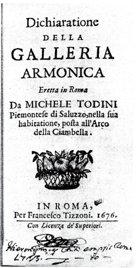 Page de titre de l'ouvrage du facteur italien Michele Todini, Dichiarazione della Galleria armonica (1676) décrivant sa collection.